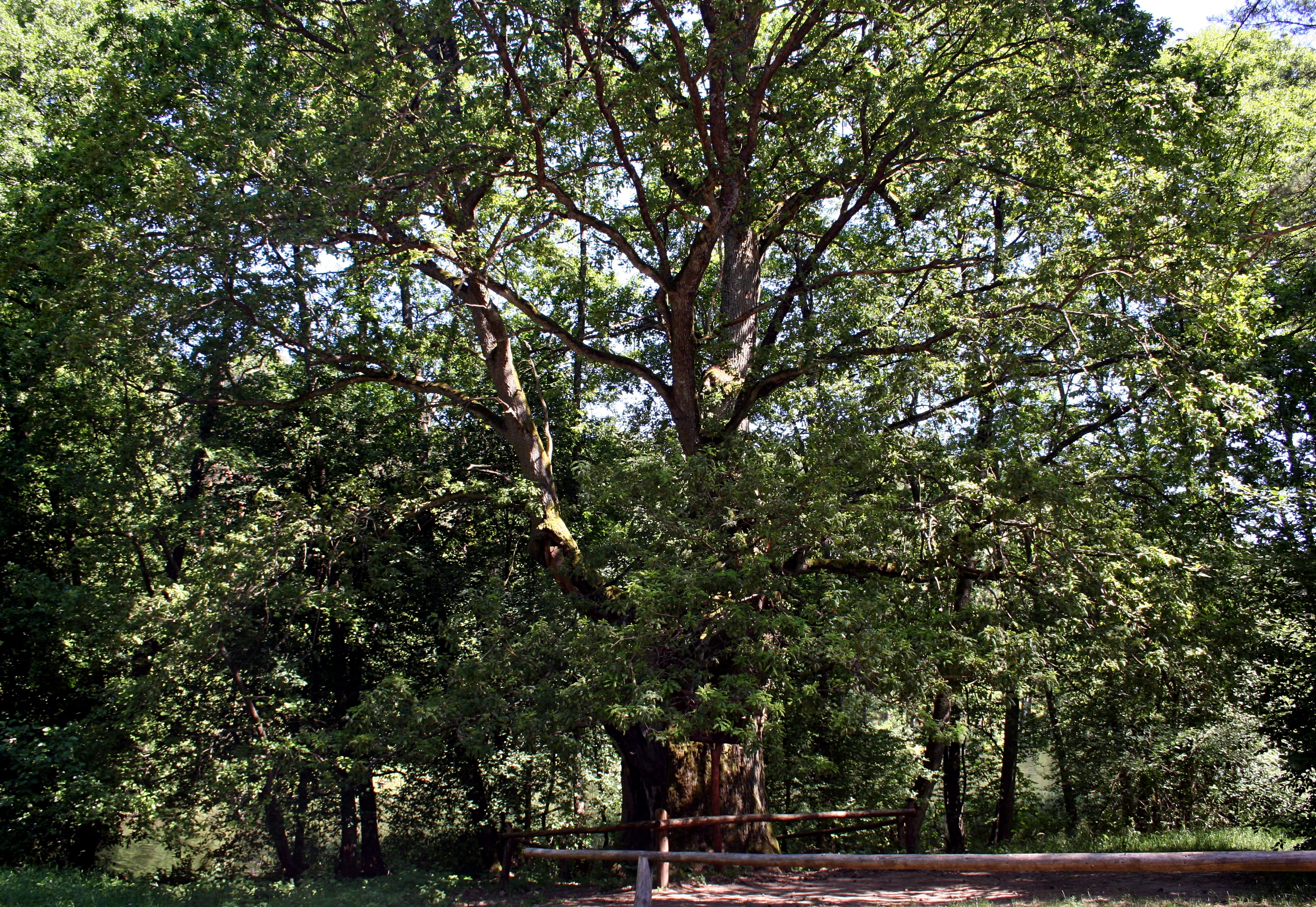 Dąb "Bartuś" w Parku Narodowym Bory Tucholskie